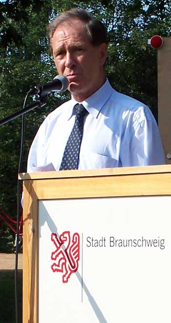 Gert Hoffman, Oberbürgermeister von Braunschweig, bei der Eröffnung eines Spielplatzes am 13.07.2006 in Braunschweig.